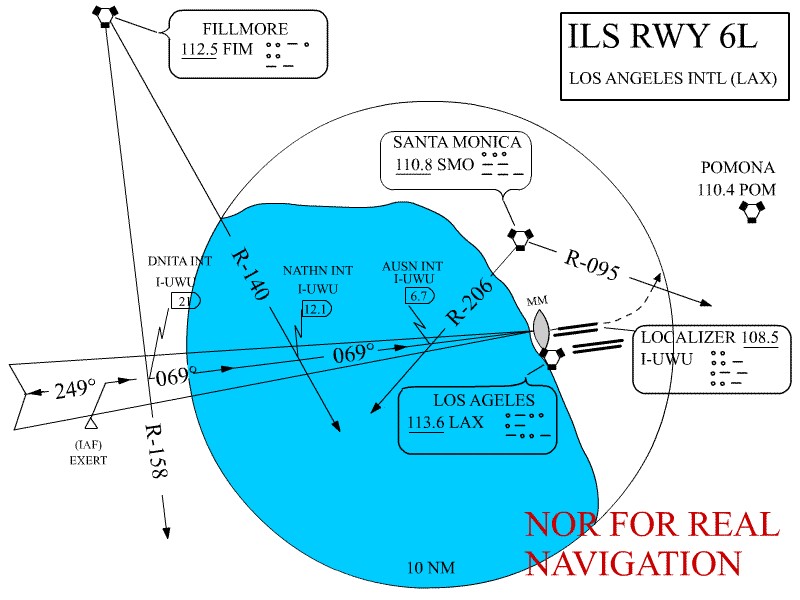 ILSKLAX6L